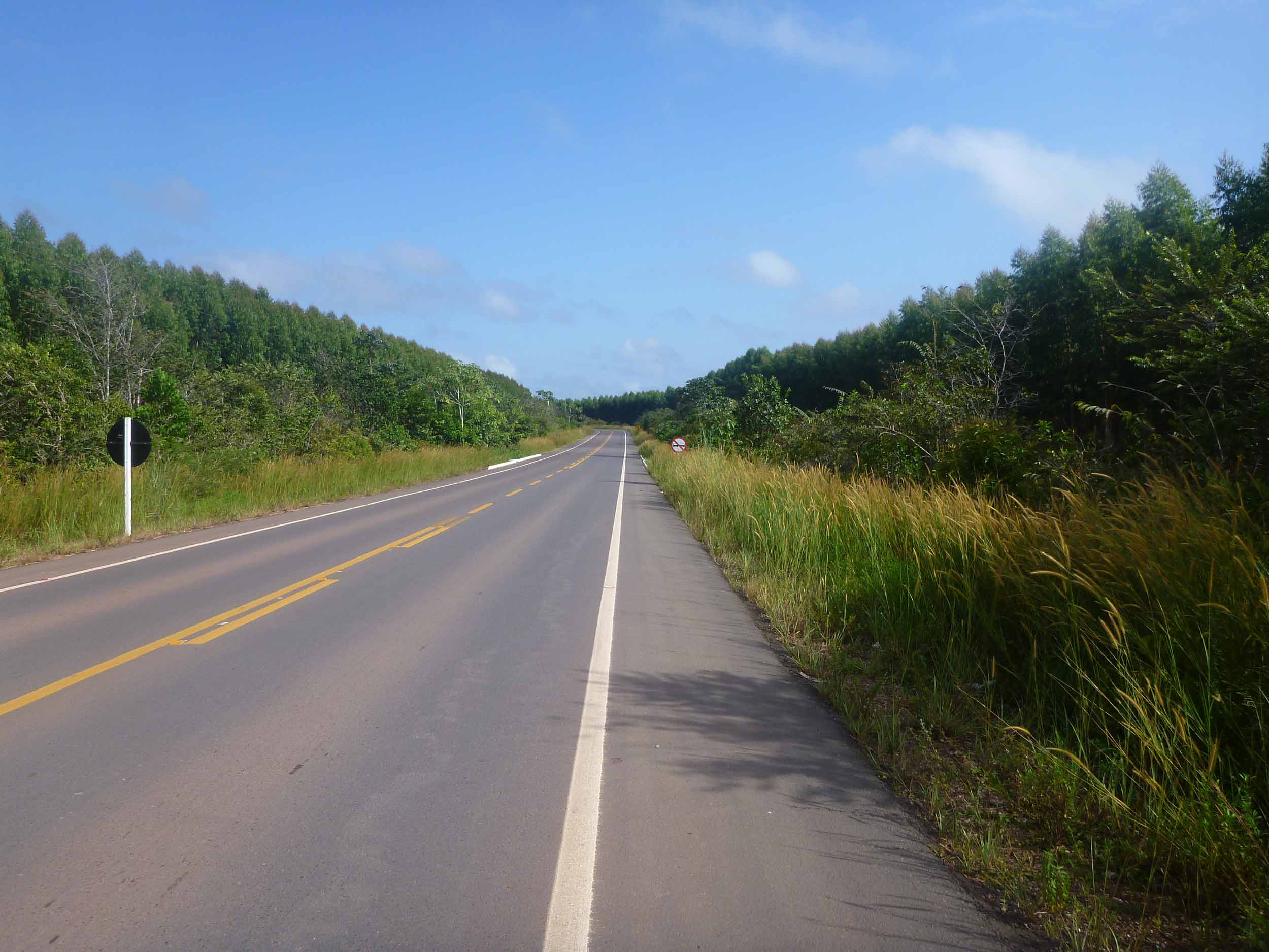 Pesquisa CNT de Rodovias 2012 - Foto: Arquivo/CNT